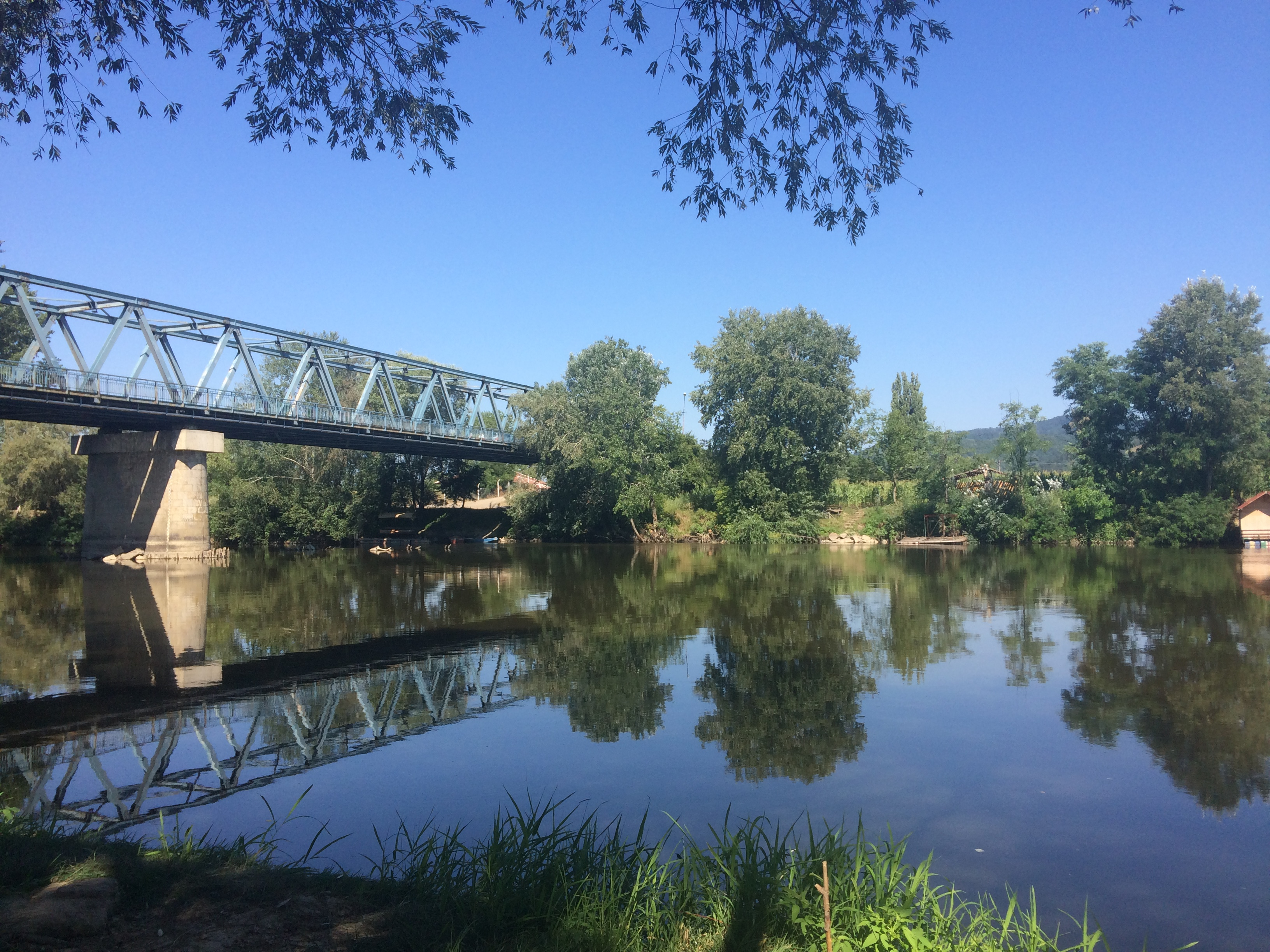 Zapadna Morava kod Trstenika